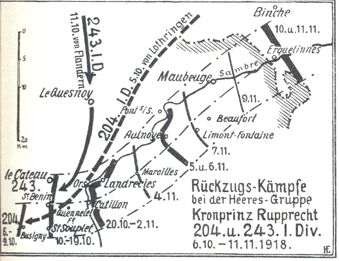 Karte: Rückzugskämpfe der 240. I.D. und 243. I.D. 1918